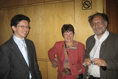 Foto di Wendelin Werner (sinistra) con Max Karoubi (destra)